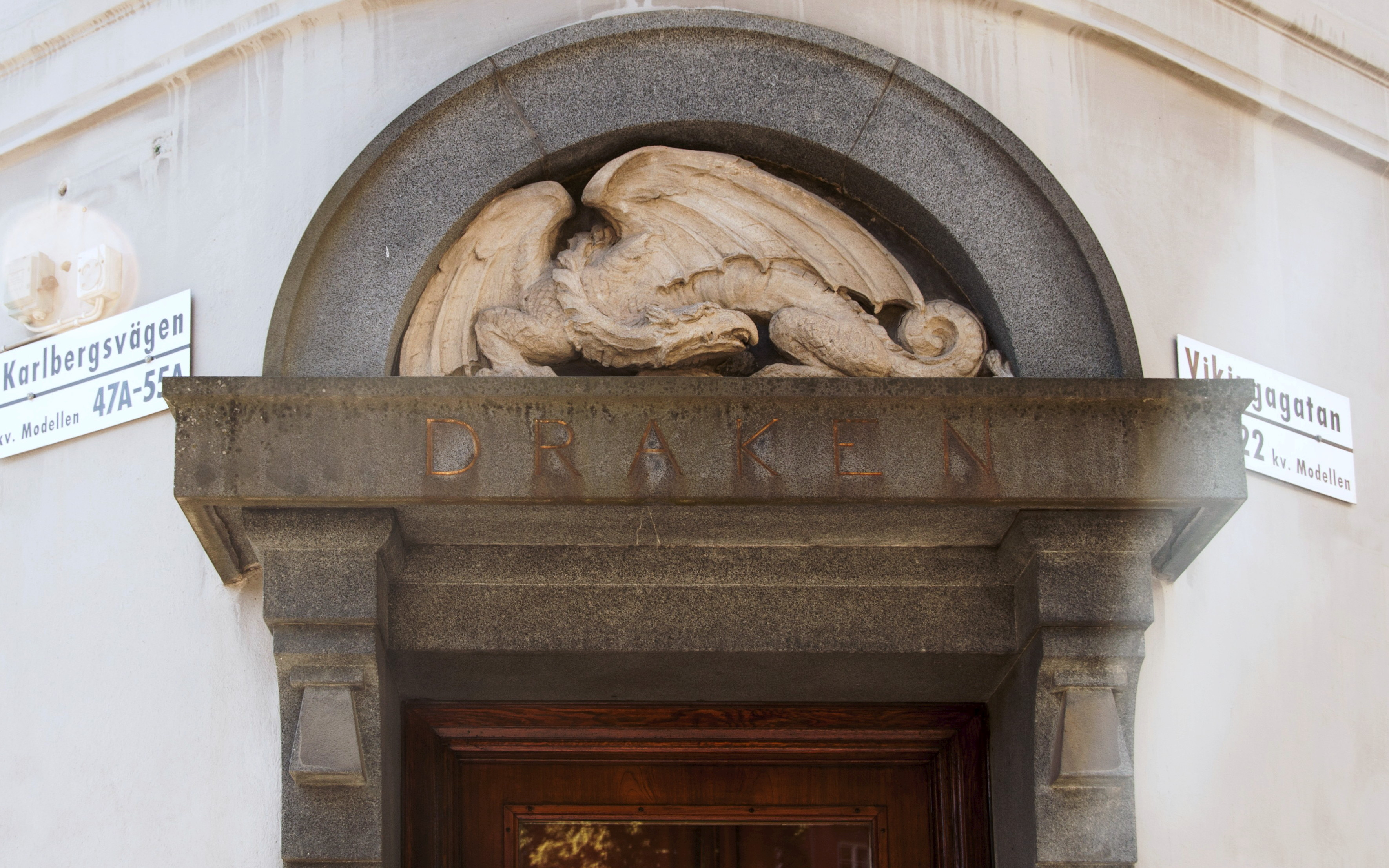 Apoteket Draken, Karlbergsvägen 55 (adressen mellan 1929 och 1981)